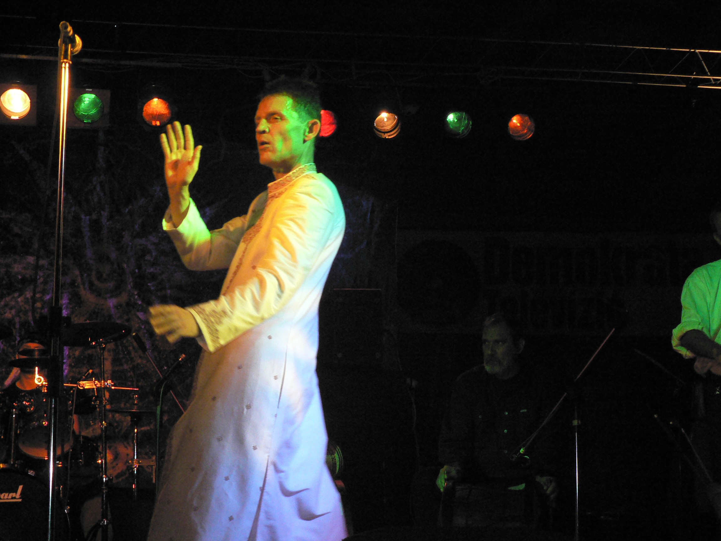 A Vágtázó Csodaszarvas és Grandpierre Attila (Magyar Sziget, Verőce, Csattogó-völgy)